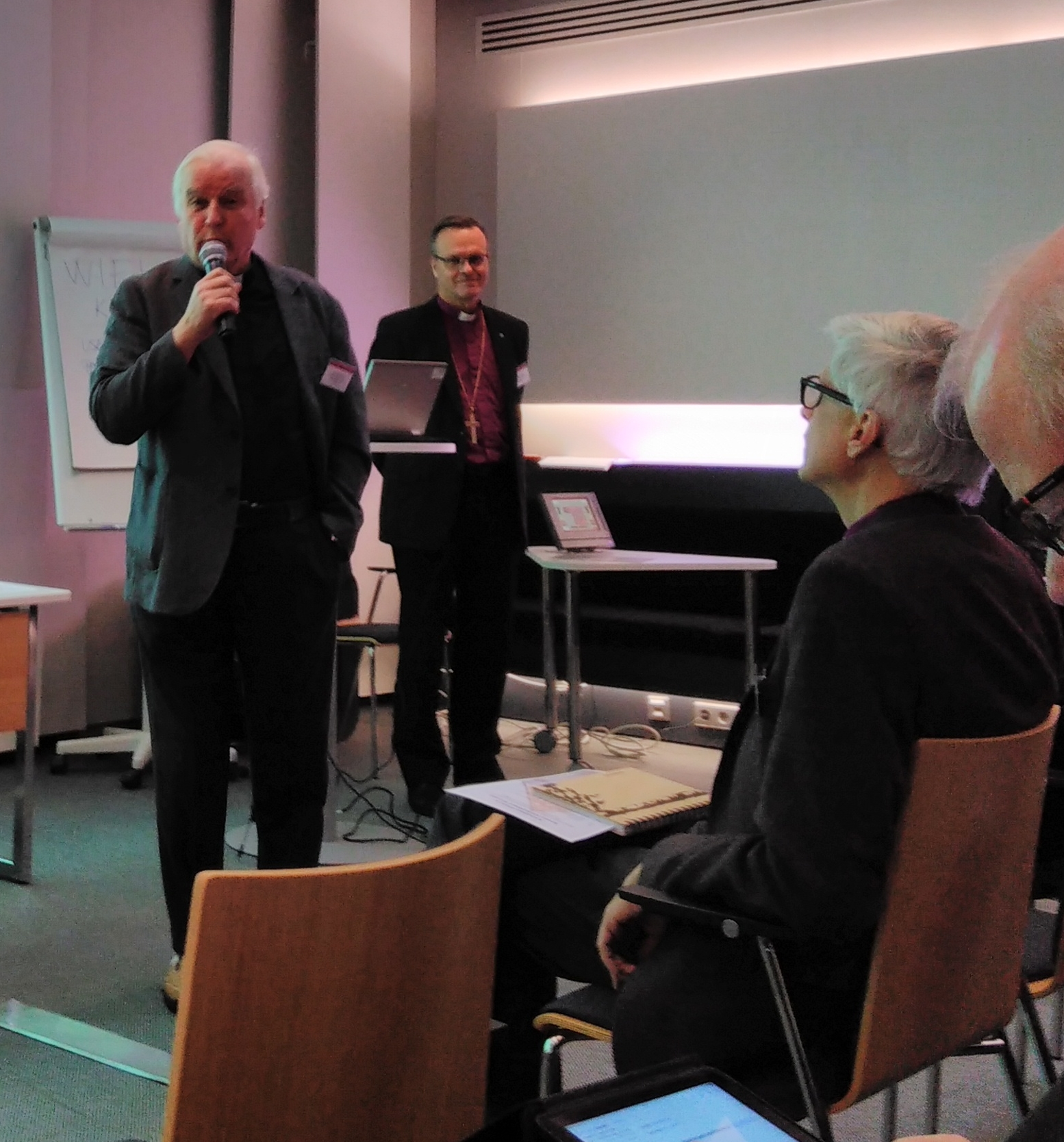 Juhani Forsberg